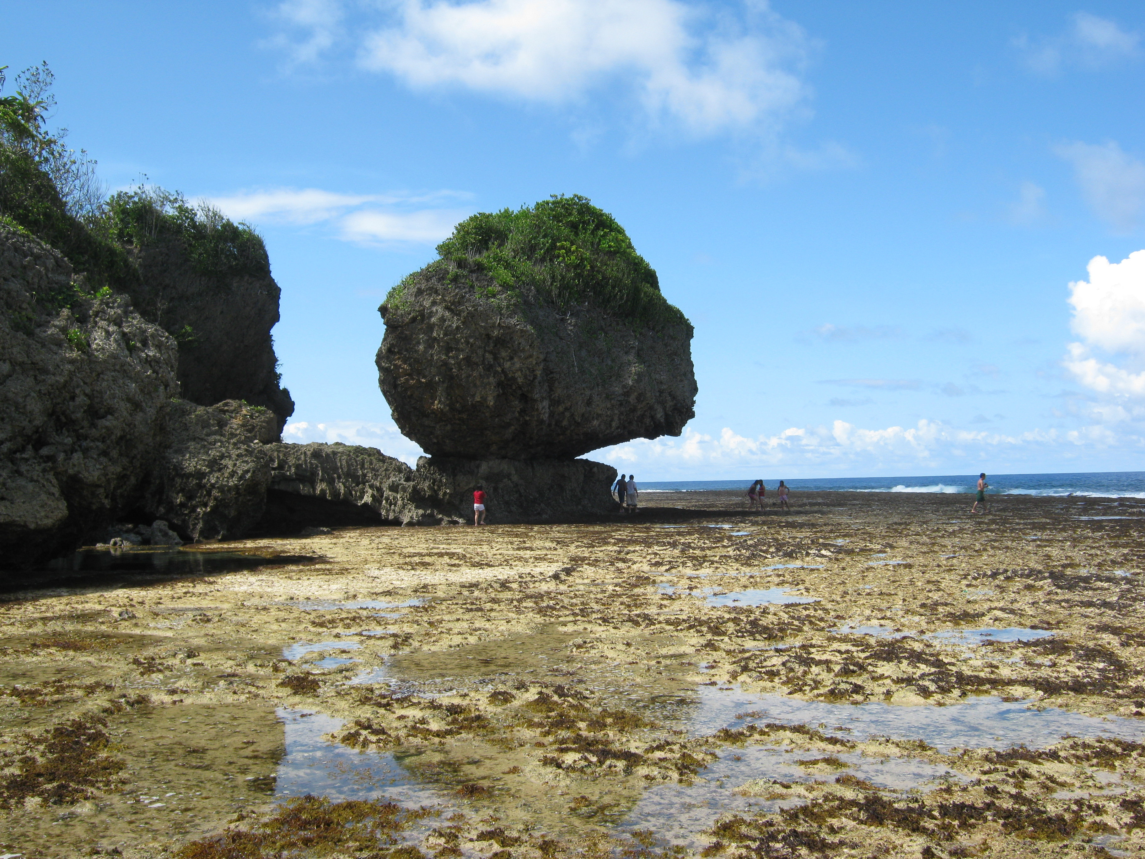 Magpupungko